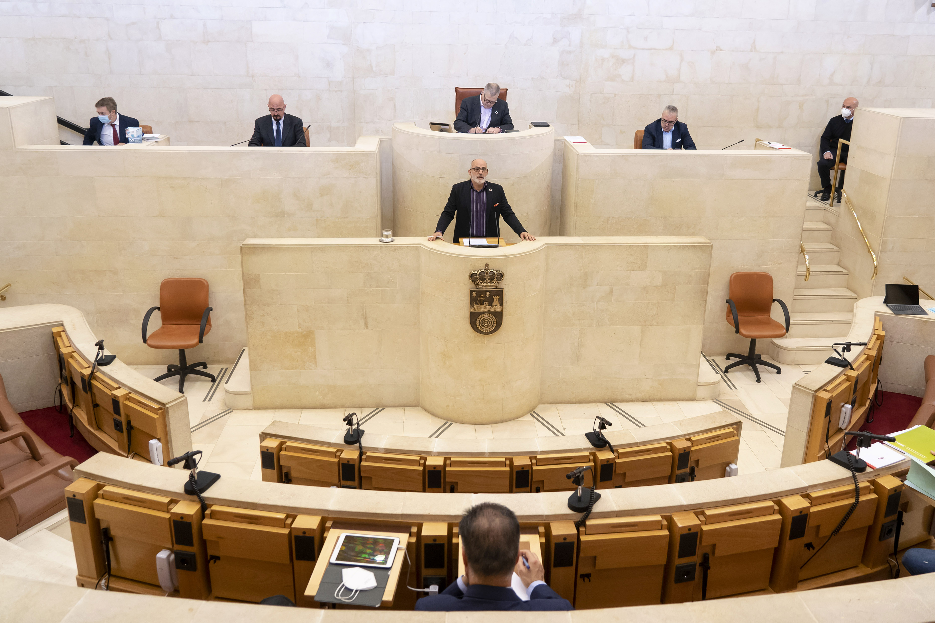 Comparecencia consejero Sanidad Miguel Rodriguez en la comision del covid-19 de el parlamento cantabro.